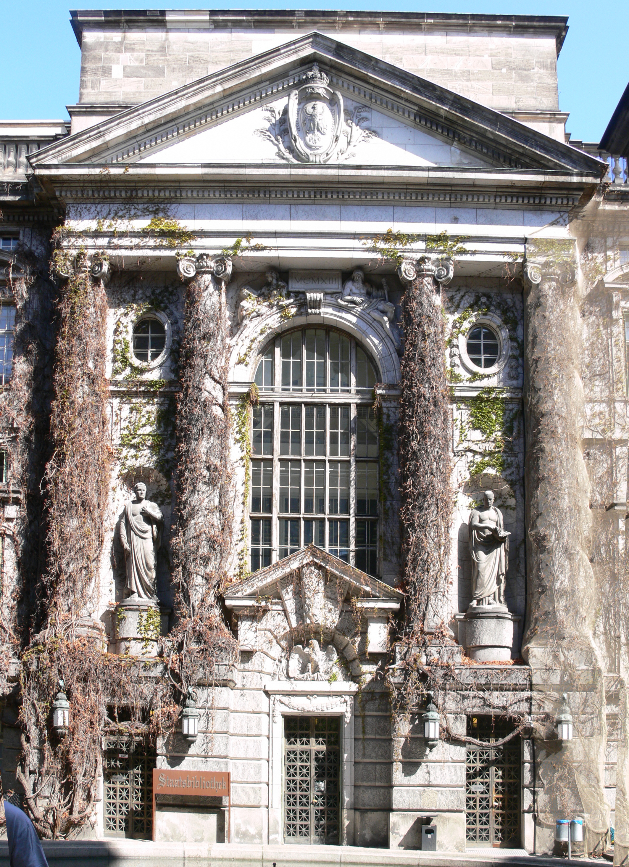 Eingangshof der Staatsbibliothek zu Berlin (Haus Unter den Linden)